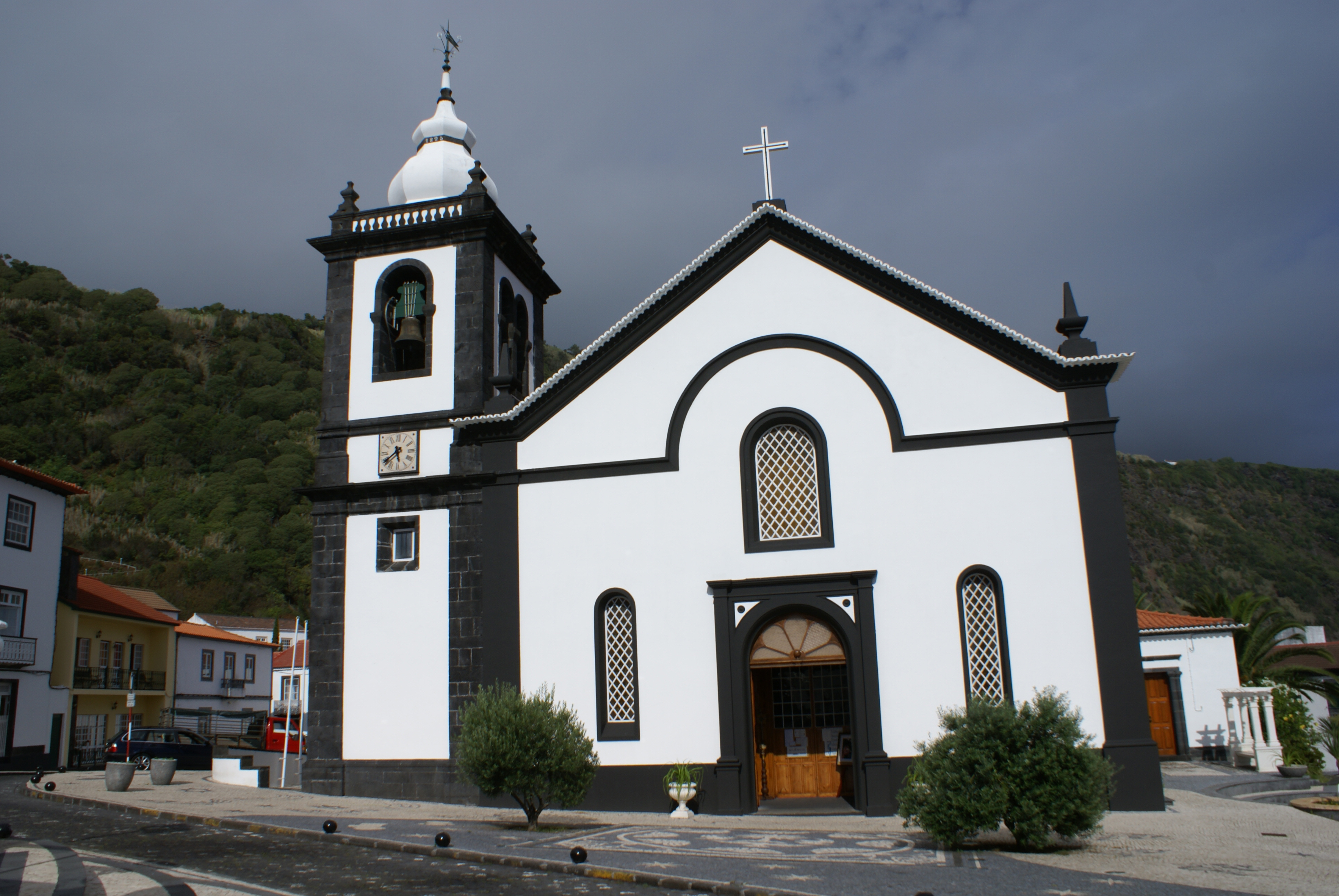 Igreja de São Jorge, fachada, Velas, Ilha de São Jorge, Açores